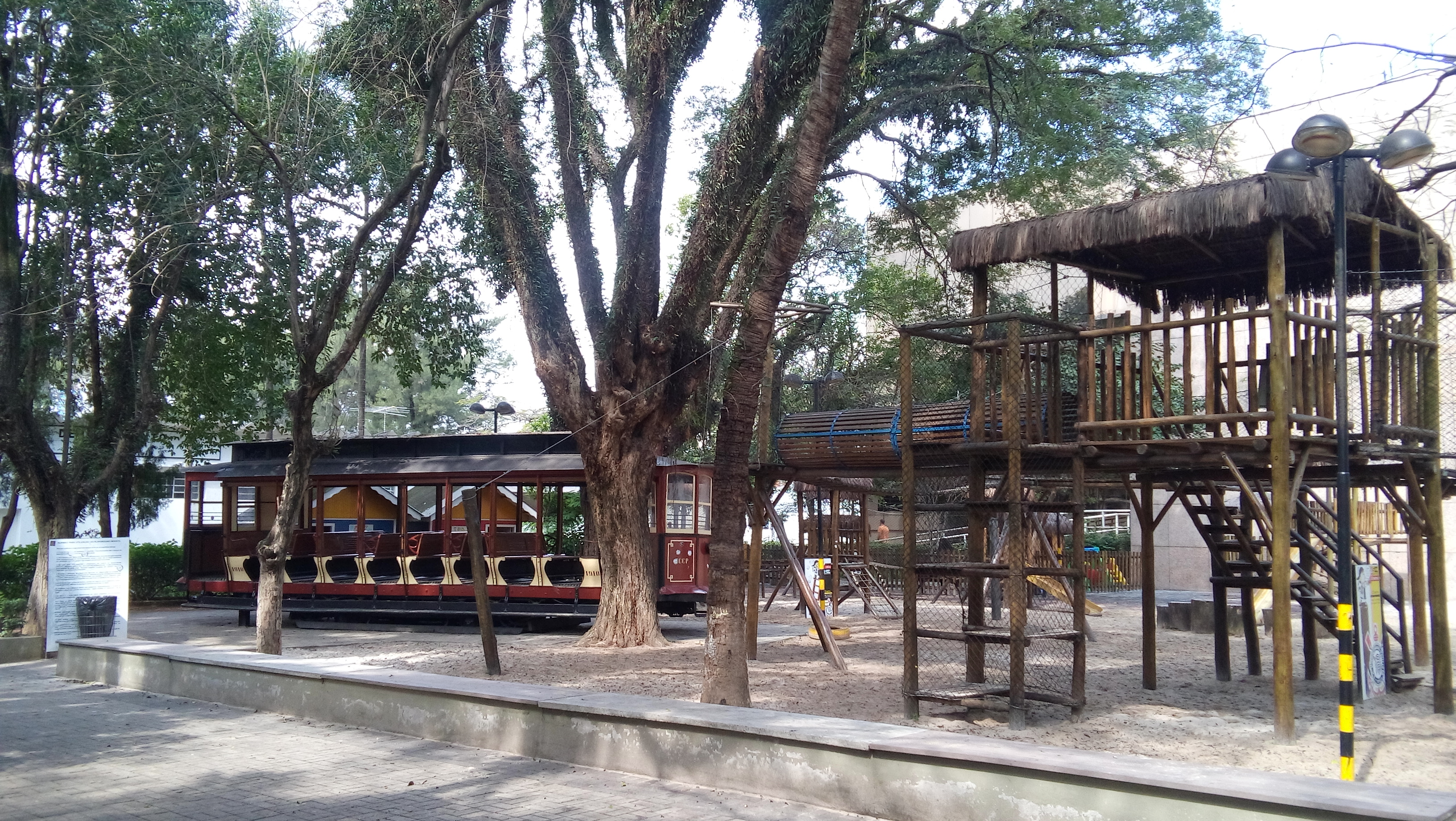 Bonde restaurado no Parque São Jorge - SCCP